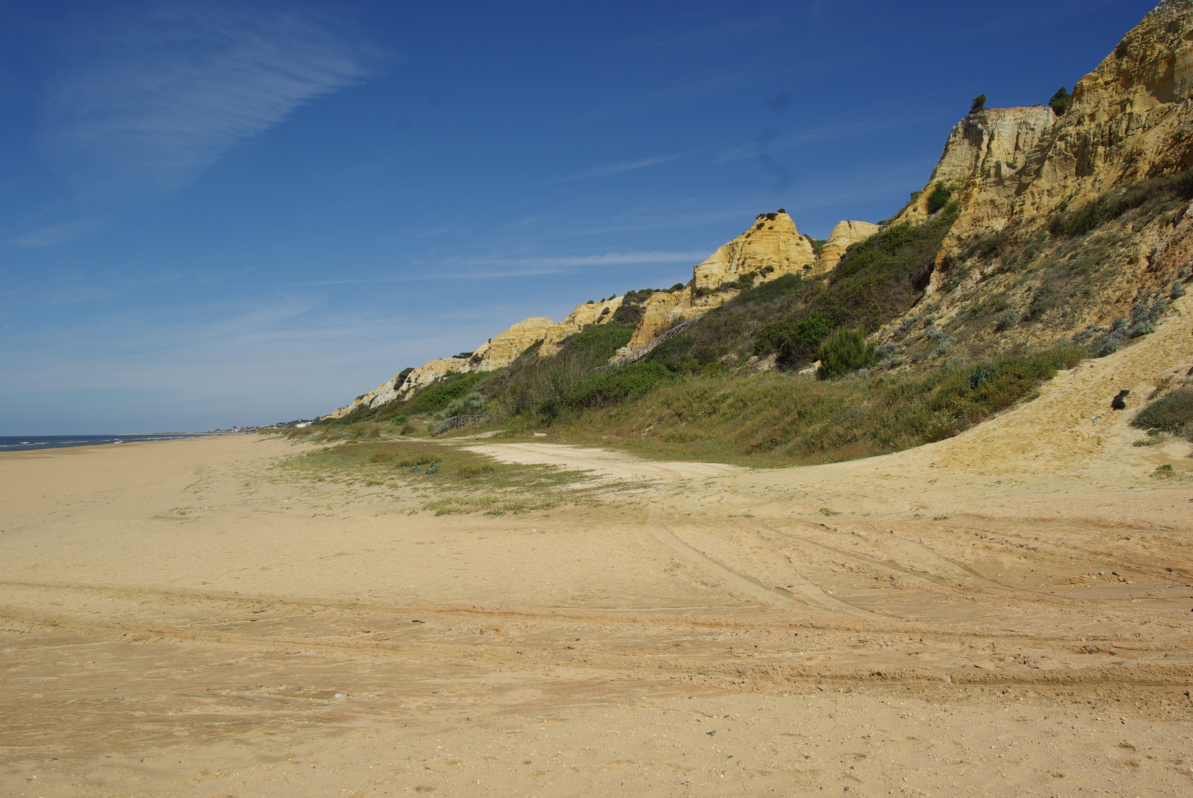 ® MAZAGON COSTA PLAYA DEL PARADOR DUNAS FÓSILES